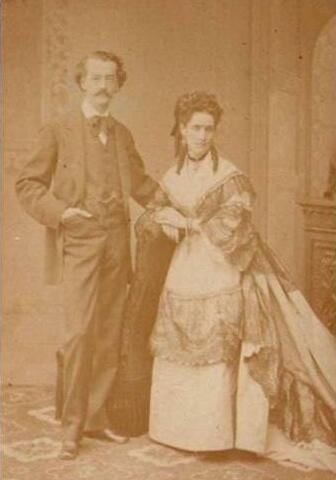 Daniel Nunez del Prado, bolivianischer Arzt und Revolutionär